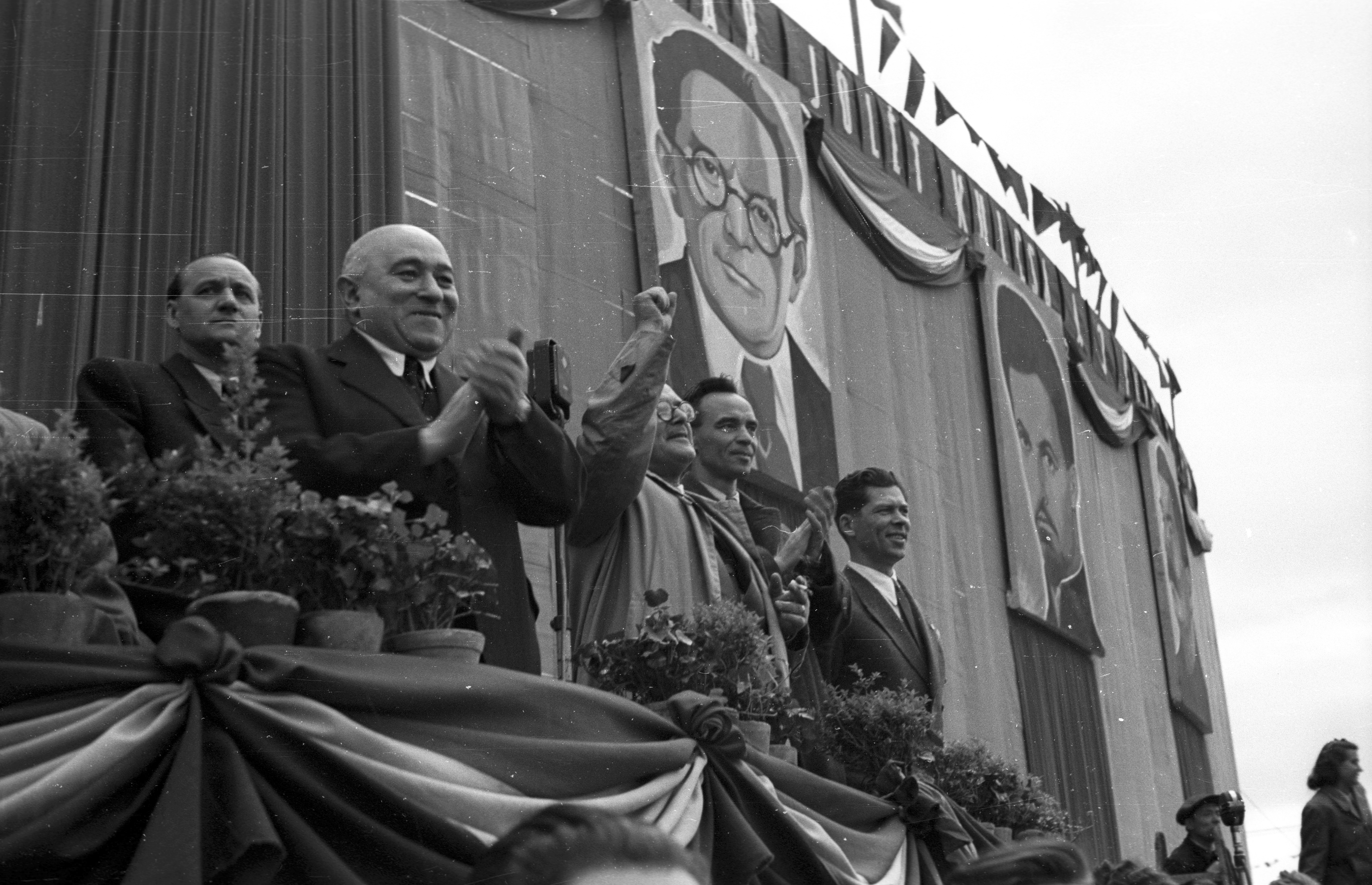 Hősök tere, május 1-i ünnepség. A tribünön elől balról Rákosi Mátyás, Szakasits Árpád, Rajk László, Marosán György. Location: Hungary, Budapest XIV. Tags: Budapest, politician, celebrity Title: Hősök tere, május 1-i ünnepség. A tribünön elől balról Rákosi Mátyás, Szakasits Árpád, Rajk László, Marosán György.